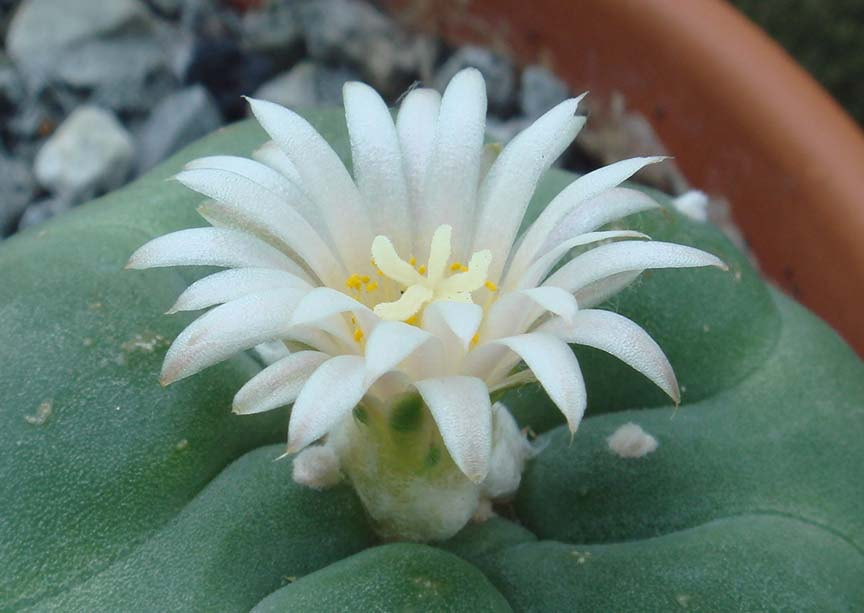 Lophophora difussa